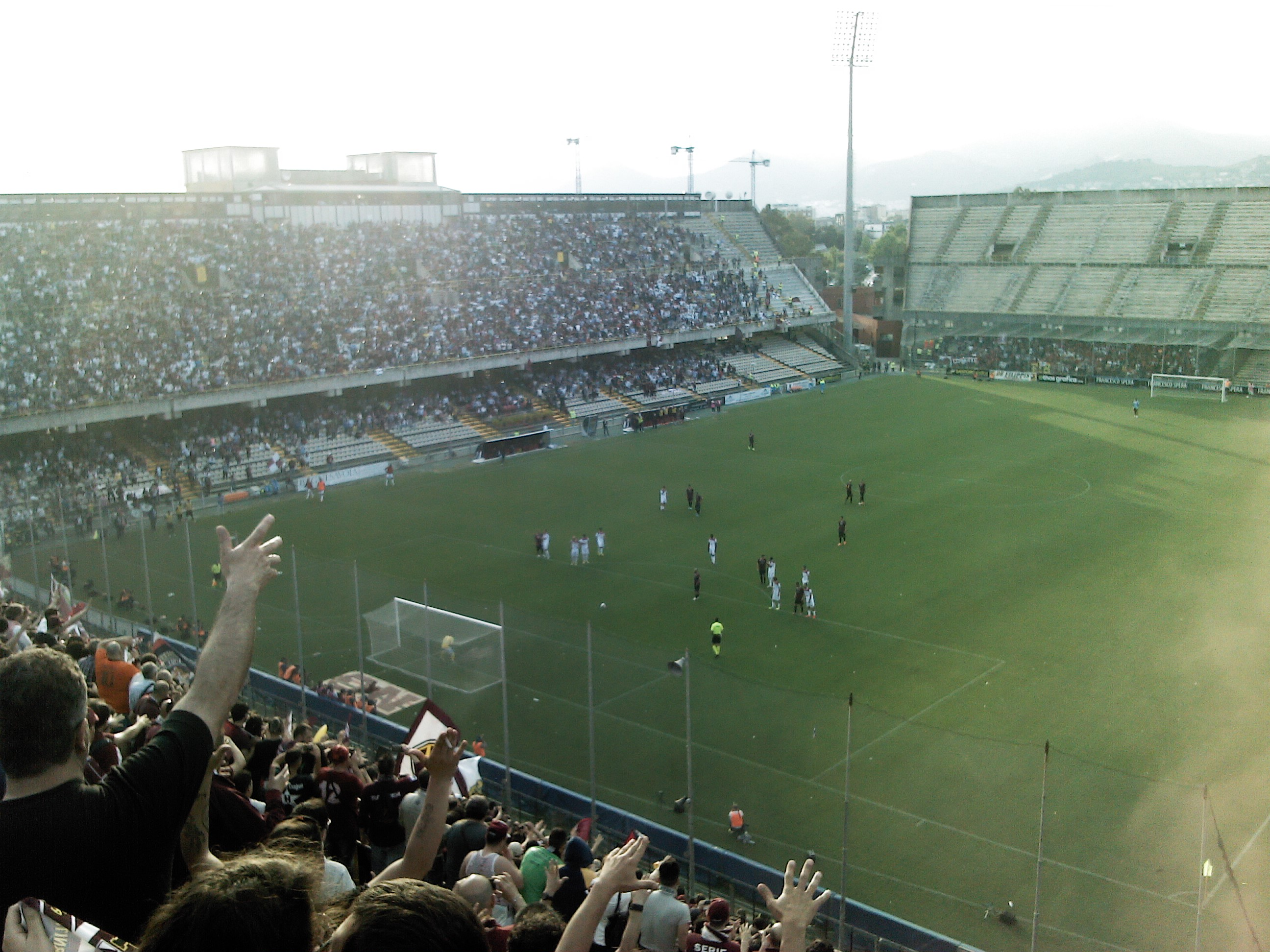 Lega Pro, ultima giornata